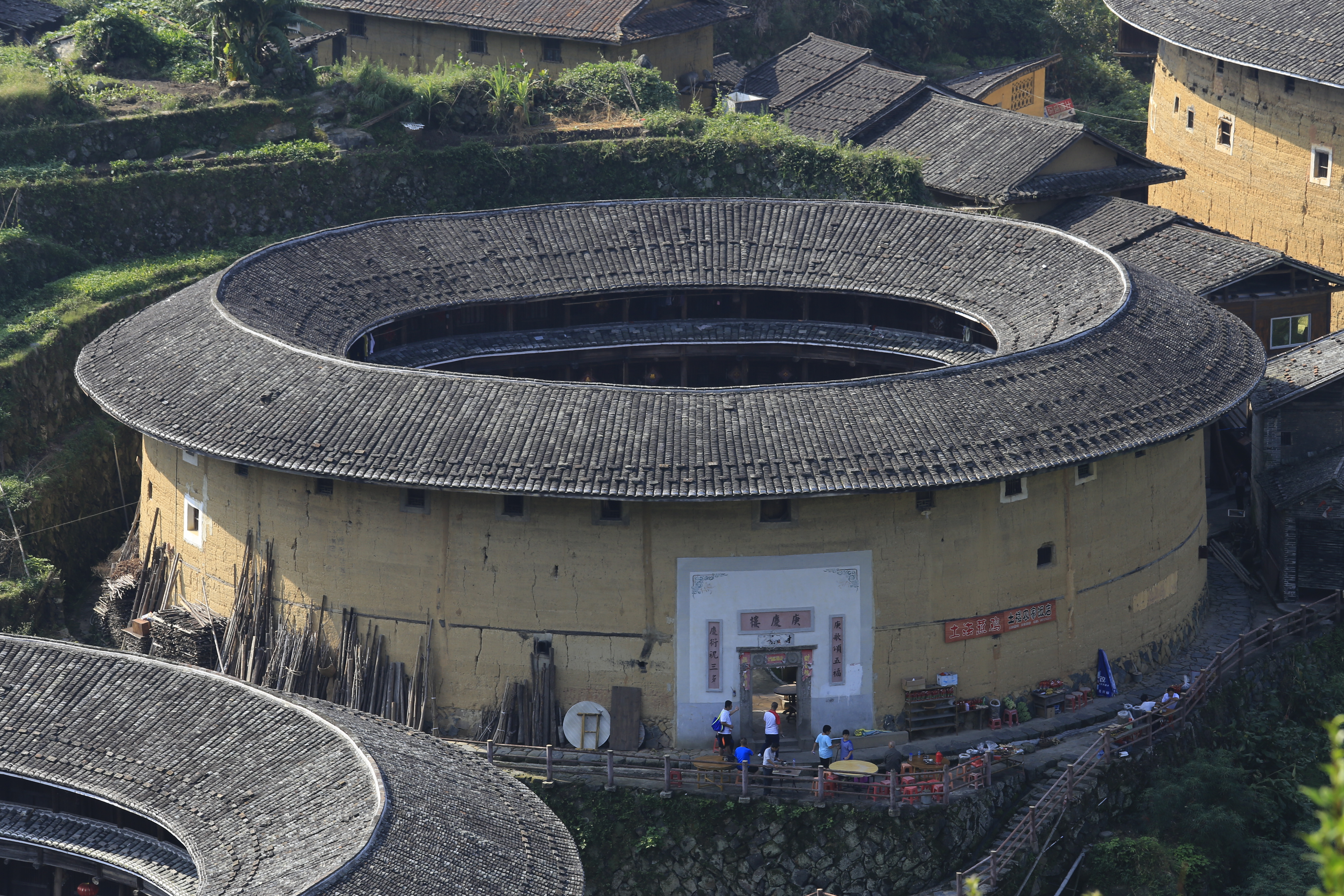 福建省永定县初溪村—— 庚庆楼